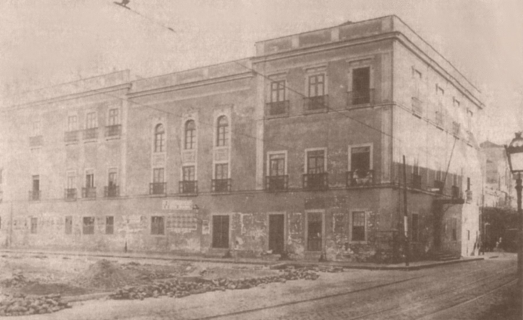 Câmara dos Deputados Gerais, no Brasil Império